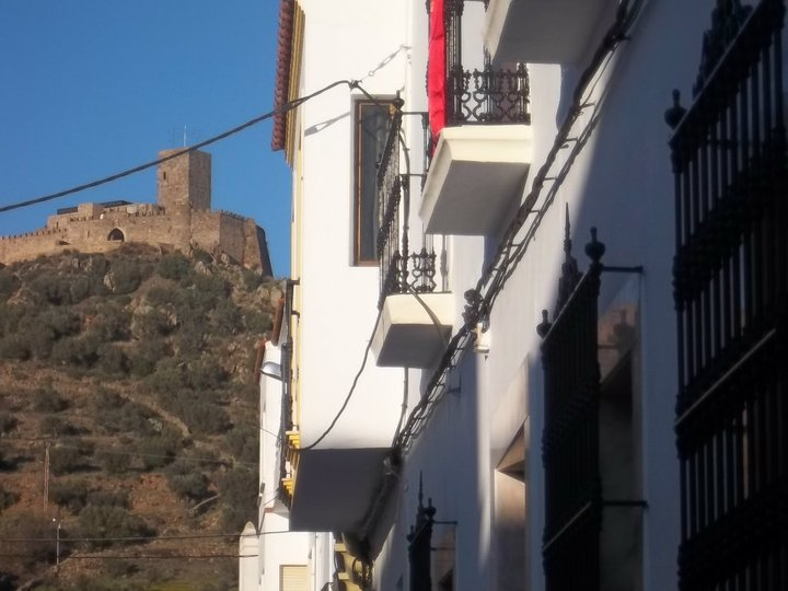 Vista del castillo Miraflores